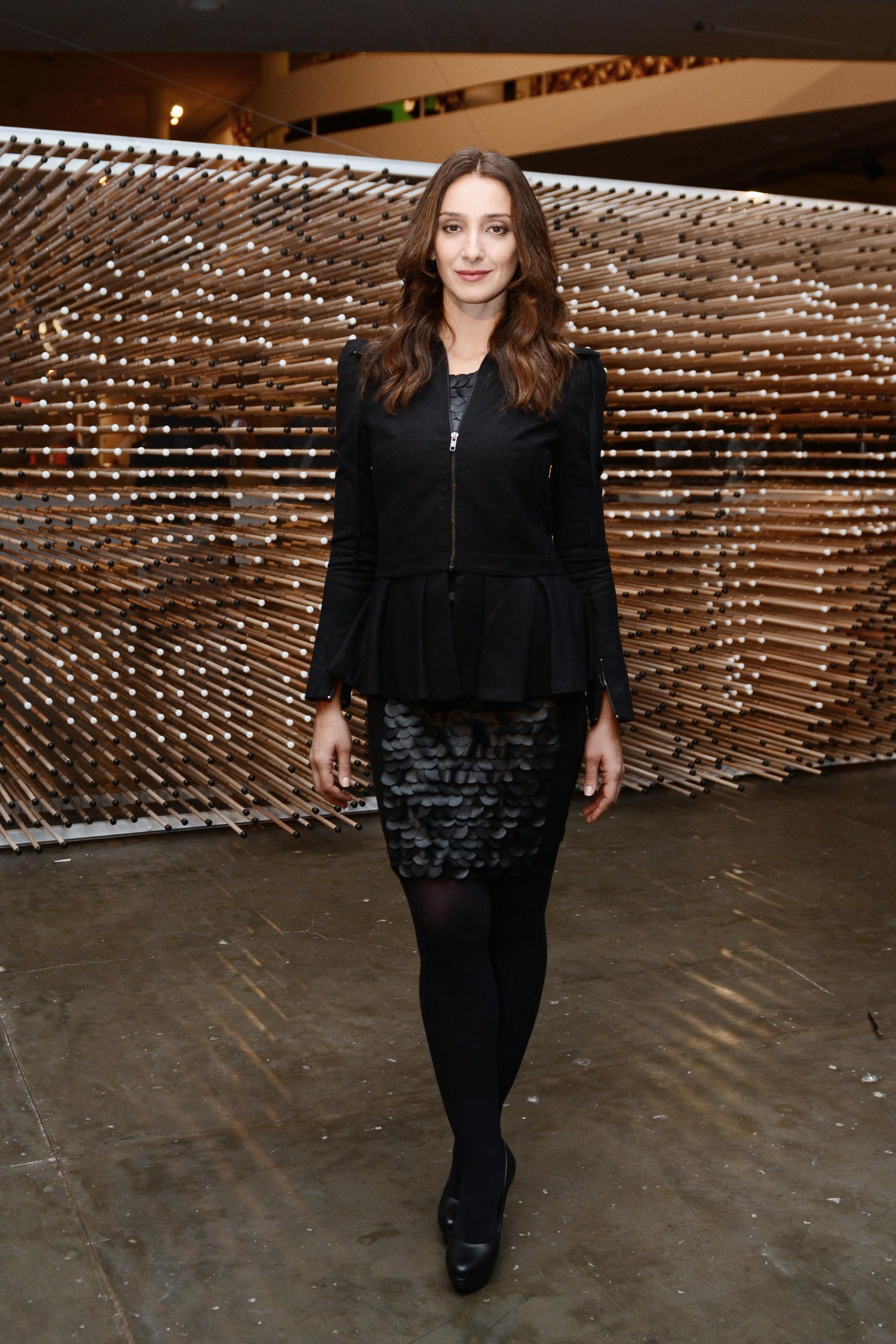 Foto: Marcos Madi